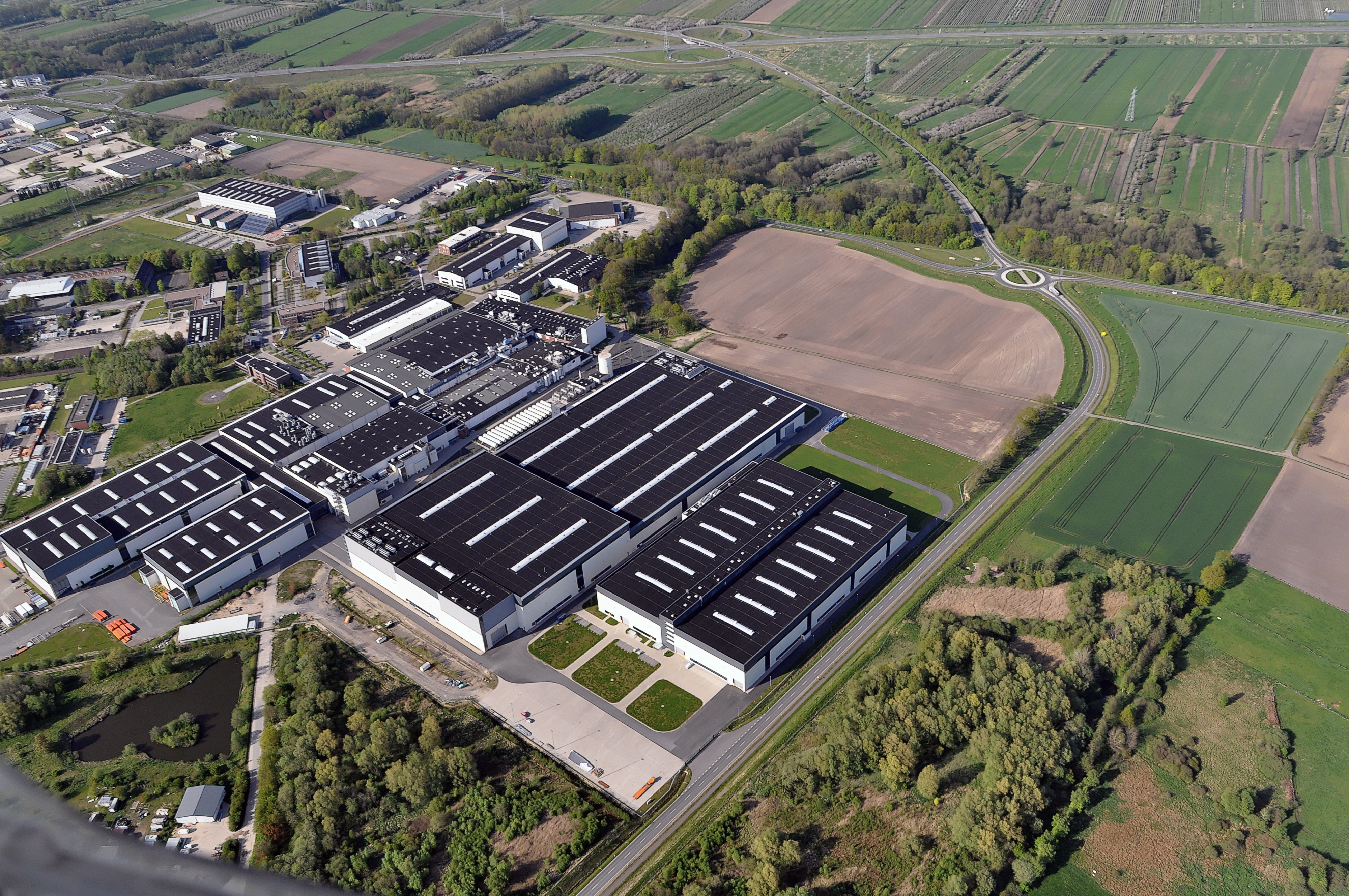 Stade-Süd. Luftbilder von der Nordseeküste 2012-05. Das Airbus-Werk in Stade